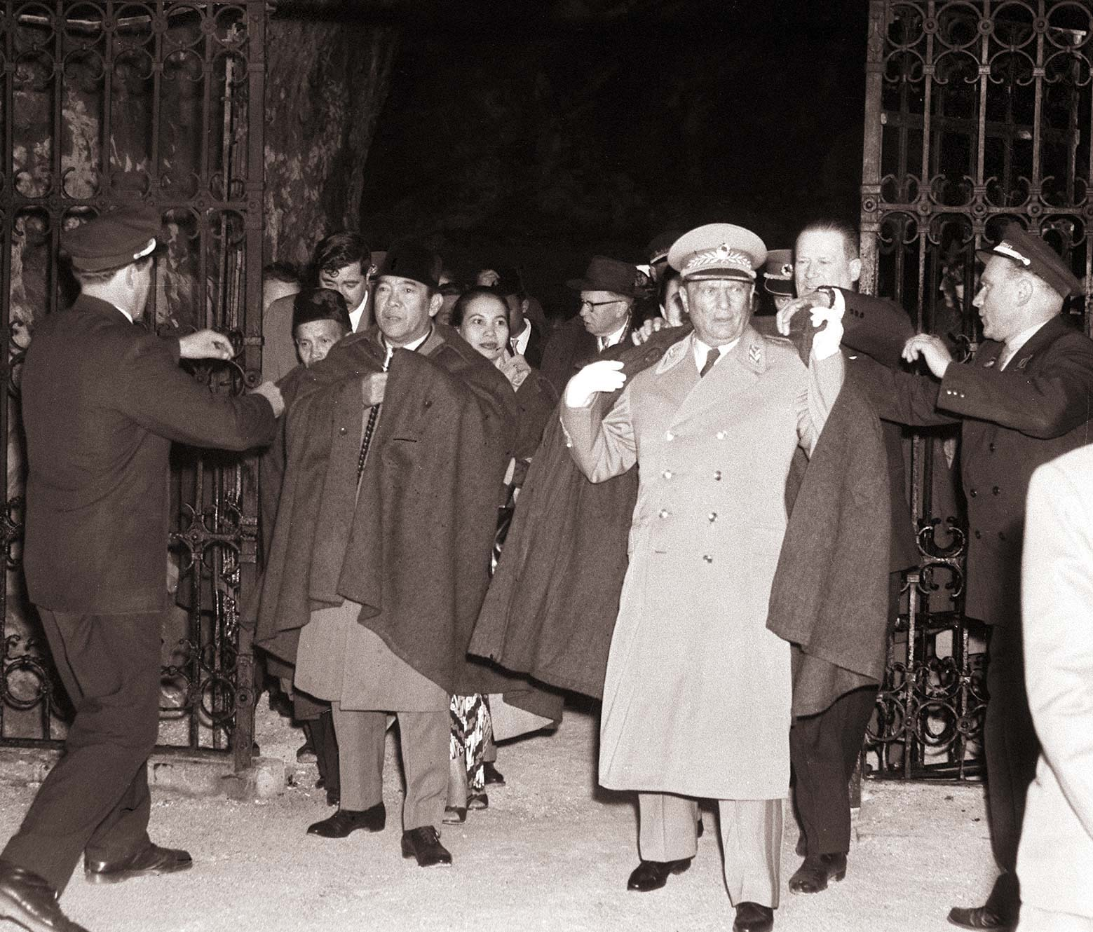 Predsednik Tito in Sukarno na izhodu Postojnske jame.